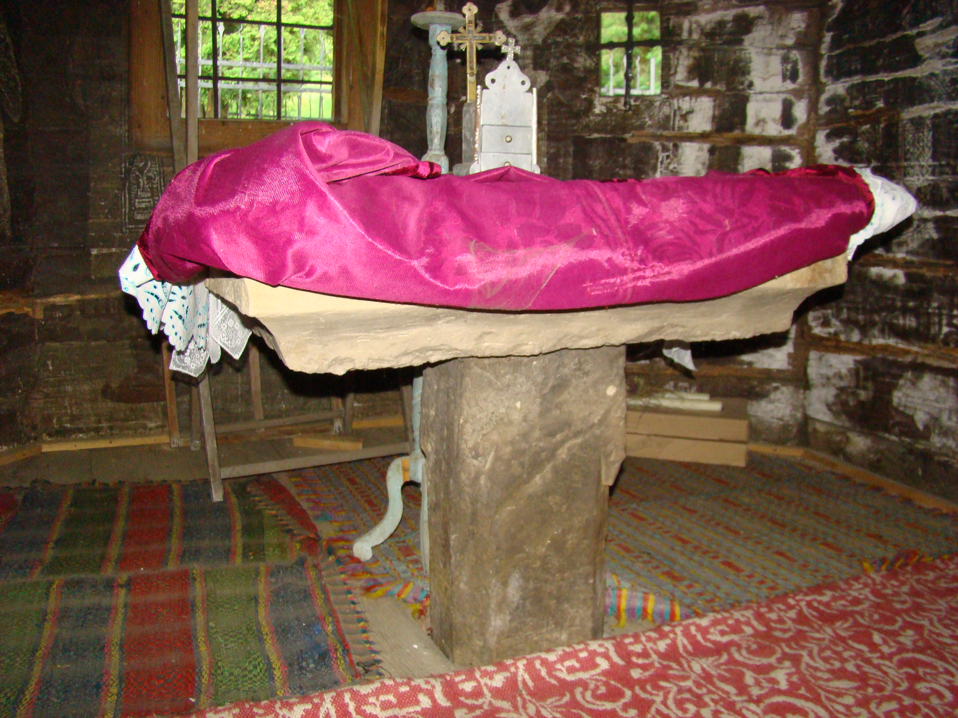 Biserica de lemn din Someșu Rece, județul Cluj